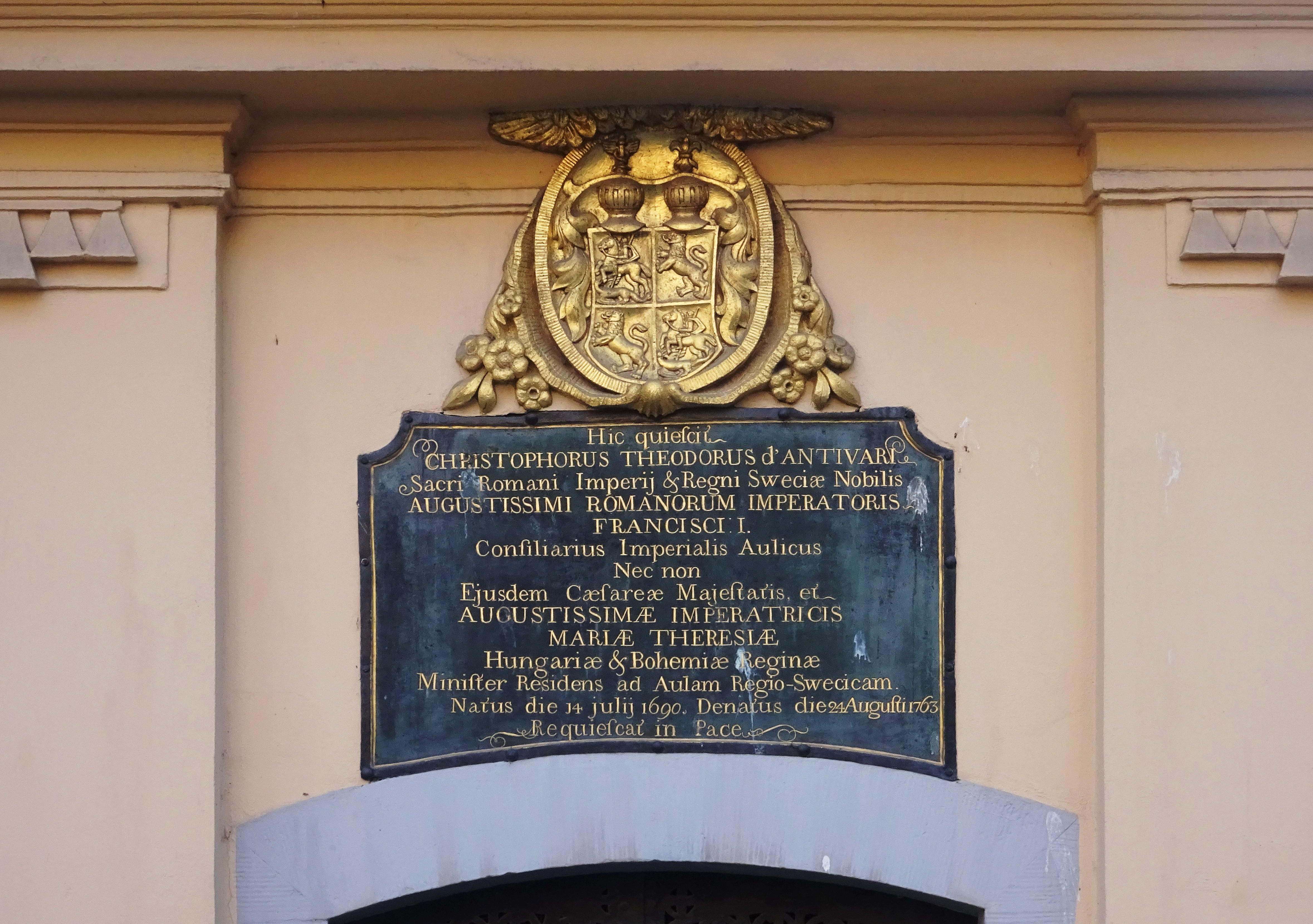 Inskription på Klara kyrkas benhus: HIC QUIESCIT / CHRISTOPHORUS THEODORUS D'ANTIVARI / SACRI ROMANI IMPERII & REGN1 SVECIAE NOBILIS / AUGUSTISSIMI ROMANORUM IMPERATORIS / FRANCISCI I / CONSILIARIUS IMPERIALIS AULICUS / NEC NON / EIUSDEM CAESAREAE MAJESTATIS ET / AUGUSTISSIMAE IMPERATRICIS / MARIAE THERESIAE / HUNGARIAE ET BOHEMIAE REGINAE / MINISTER RESIDENS AD AULAM REGIO SVECICAM / NATUS DIE 14 JUL. 1690 DENATUS DIE 24 AUGUSTI 1763 / REQUIESCAT IN PACE.